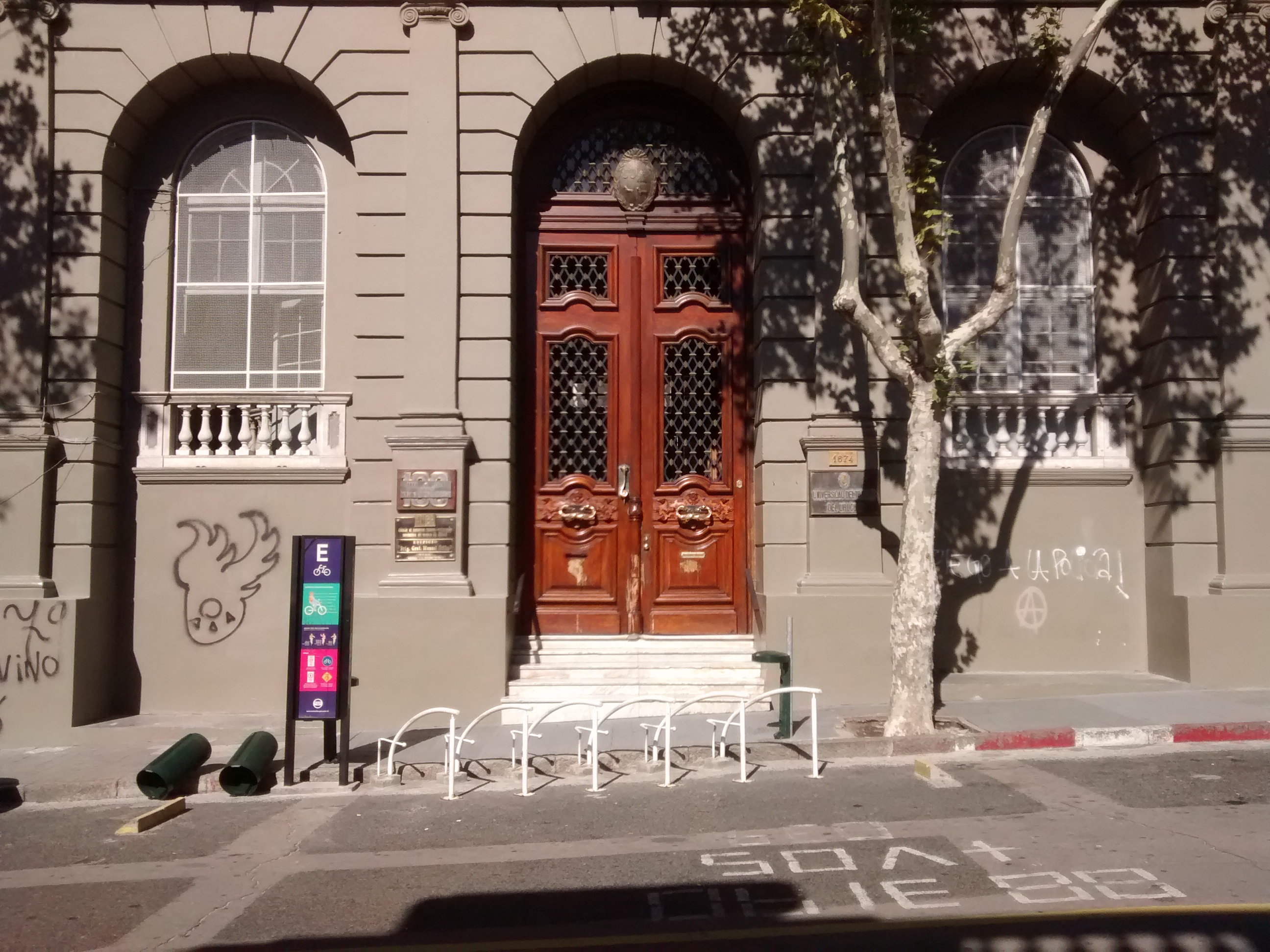 Universidad del Trabajo del Uruguay, San Salvador 1674, Montevideo.